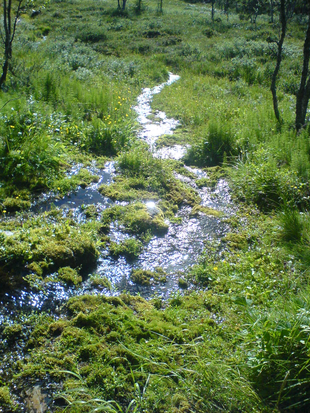 Fotot är taget i en av bäckarna i närheten av det stora myrområdet som kallas för Aloppkölen.